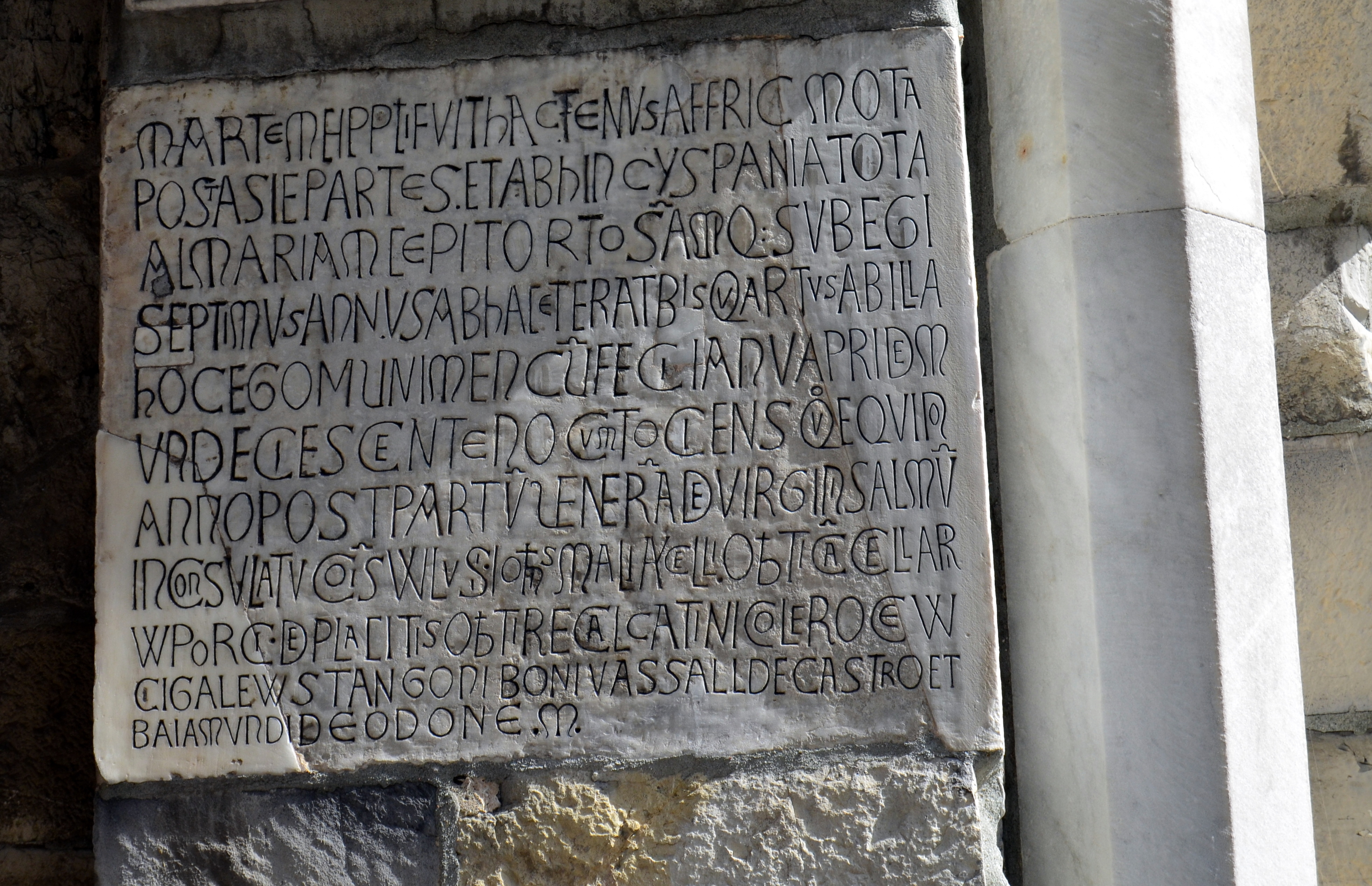 Porta Soprana, Genova, Liguria, Italia